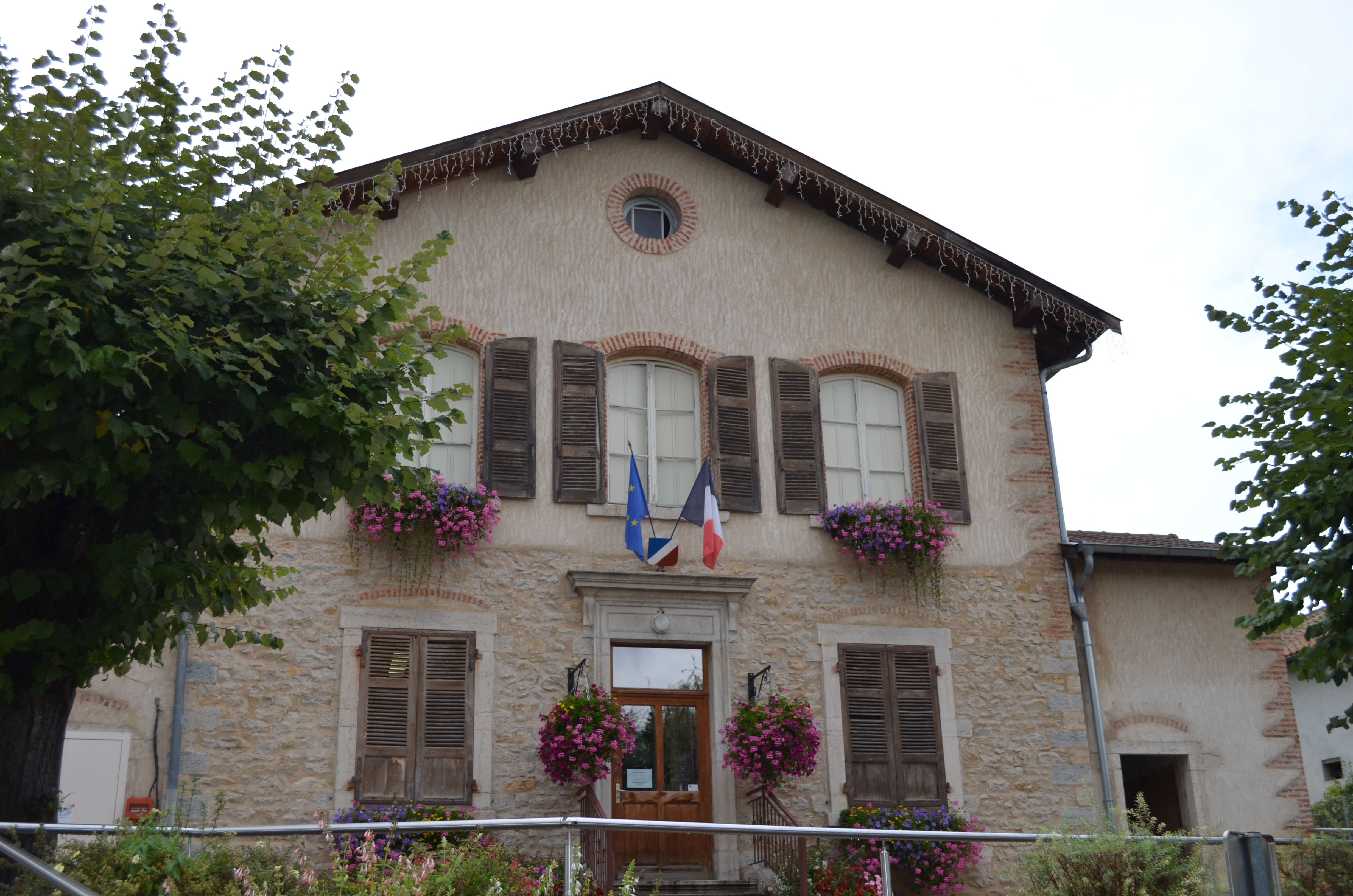 Mairie de Villette-sur-Ain.